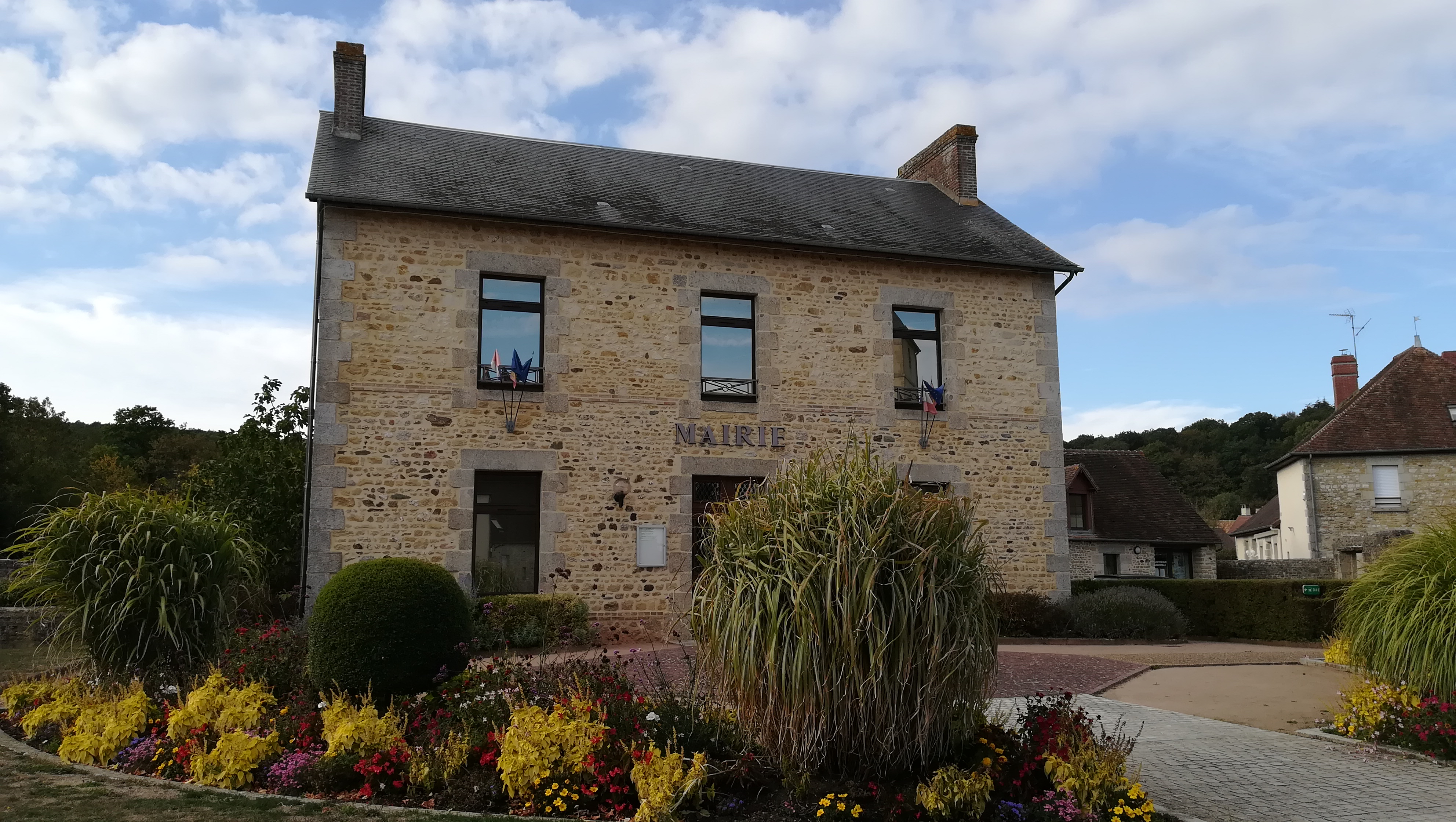 Mairie de Radon, Orne